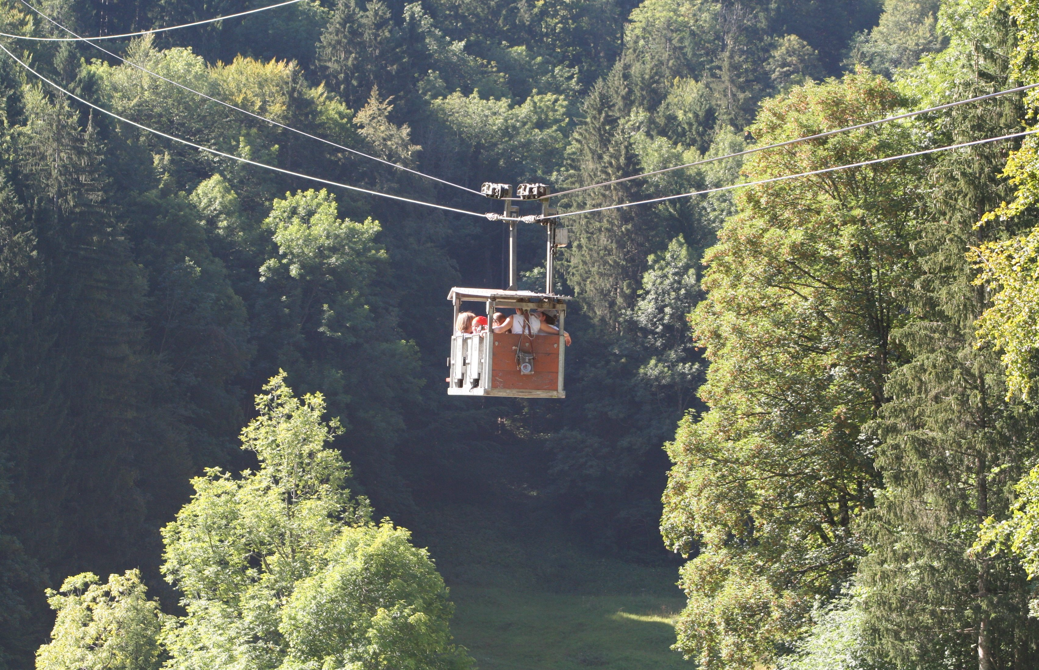 Die Selunbahn (Kistenbahn) von Starkenbach zur Alp Selun im Toggenburg.